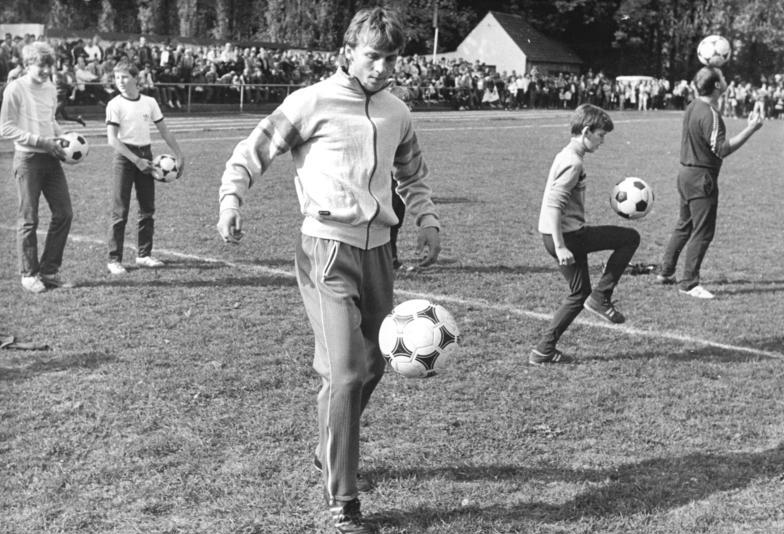 ADN-ZB-Kluge 7.10.86-eng-Bez. Leipzig: "Alle reden vom Fußball, wir spielen" - zum Finale dieser Junge-Welt-Aktion waren bekannte Fußballer der DDR in die Gemeinde Krostitz gekommen. Beim Balljonglieren wetteiferte Nationalspieler Andreas Thom (vorn) mit großen und kleinen Kickern."